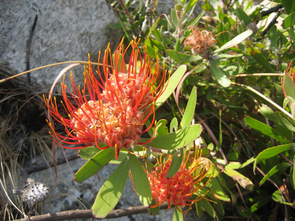 Leucospermum saxosum, Chimanimani Mountains of Mozambique.